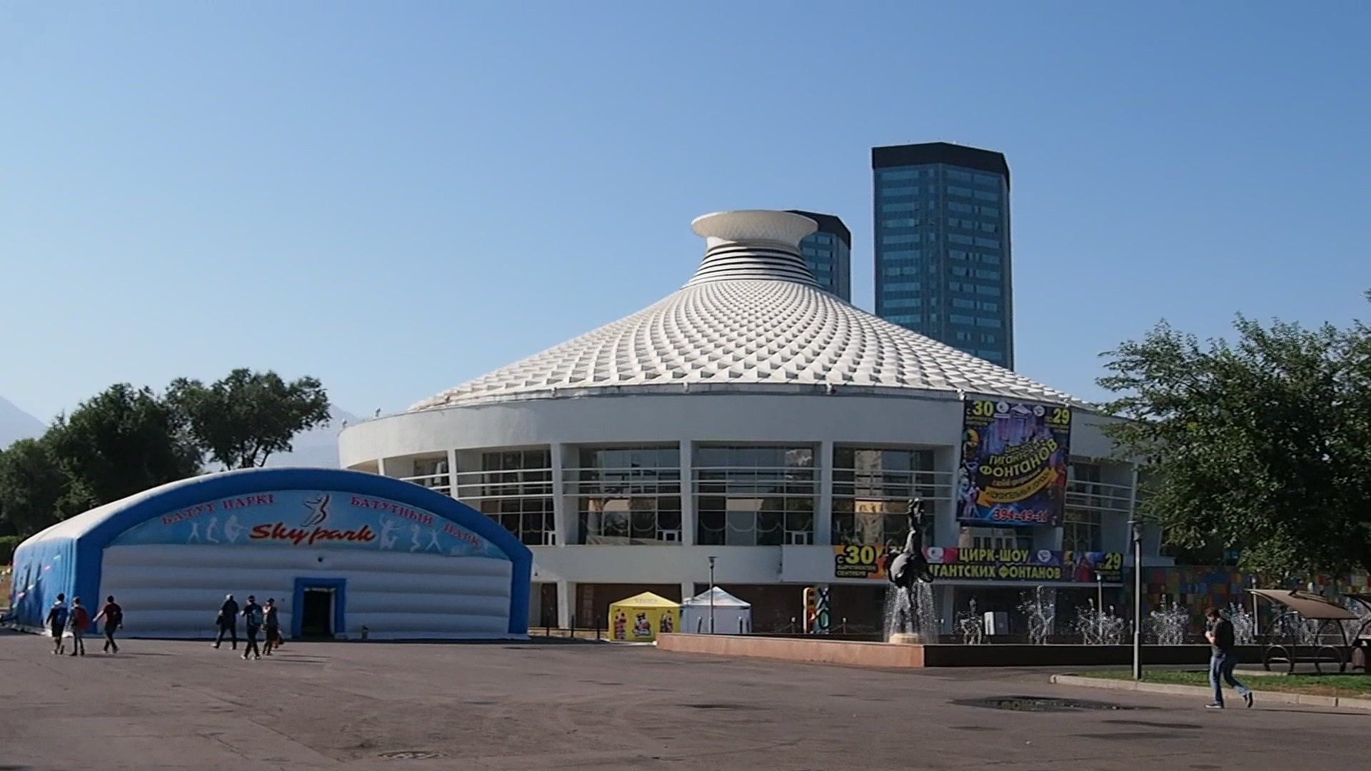 P9200599 14